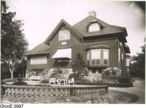 Soltorpet, Brödragatan 8 i Göteborg. Foto av Aron Jonason före 1915. Bildsamlingen vid Göteborgs stadsmuseum.